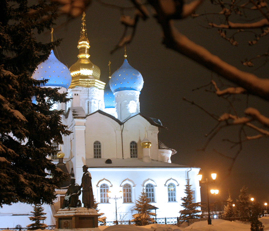 Kazan, Russia Kremlin